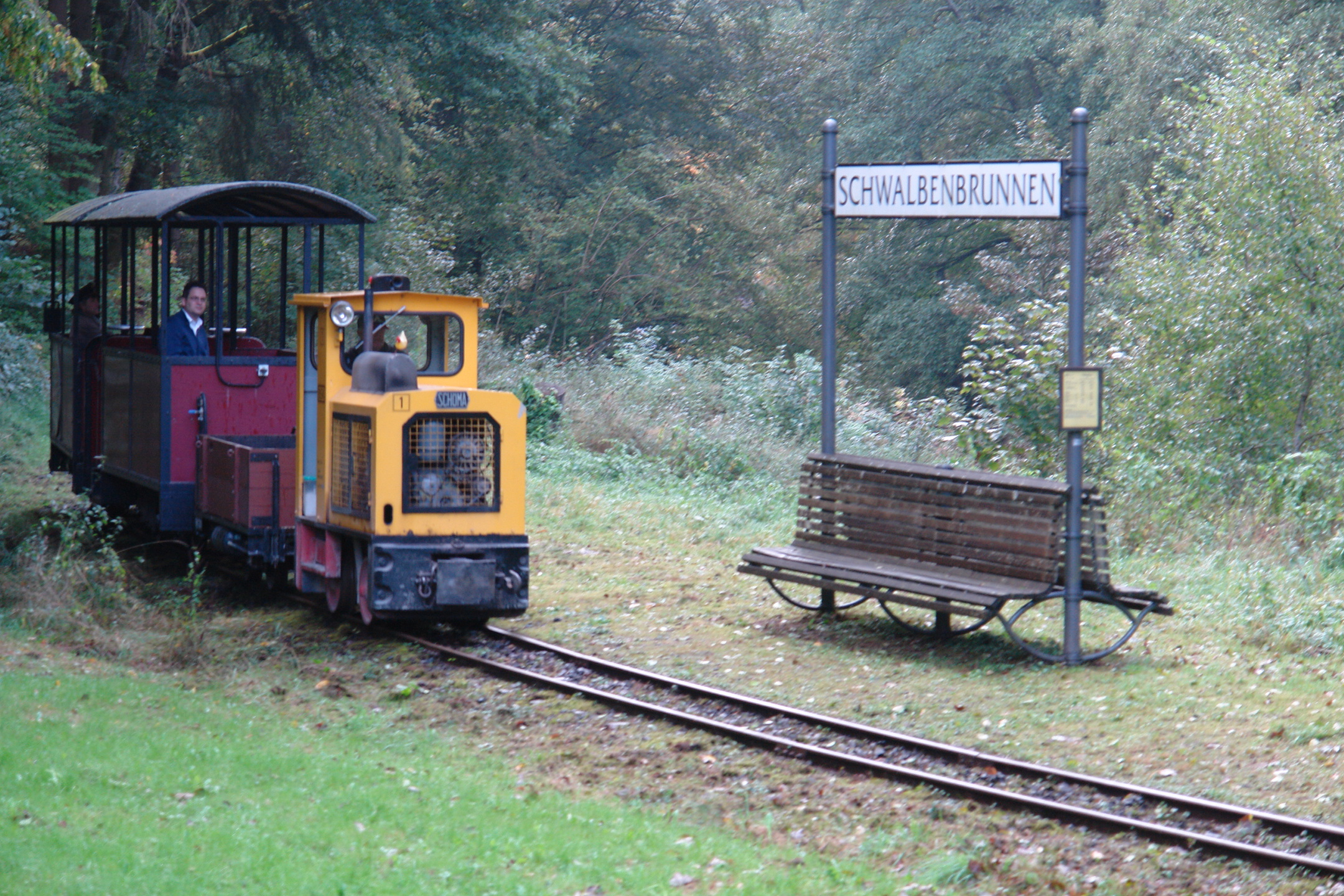 Bad Schwalbacher Kurbahn